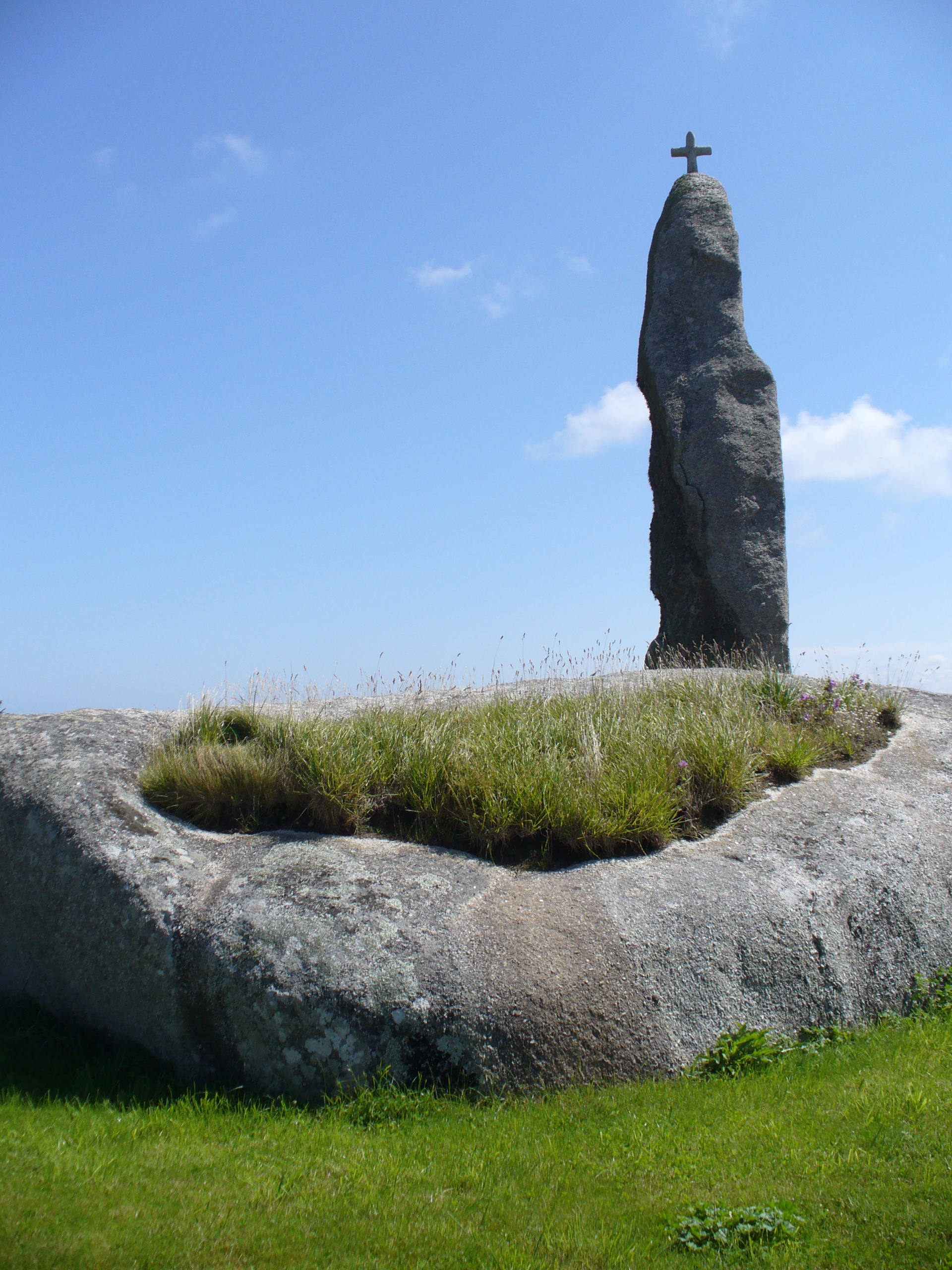 Der Menhir Men Marz ist mit einer Größe von 8,50 Meter und einem Gewicht von 80 Tonnen einer der vier höchsten Menhire Frankreichs. Das Kreuz an seiner Spitze als Zeichen seiner späteren Christianisierung. Brignogan-Plages, Finistère ,Côte des Légendes